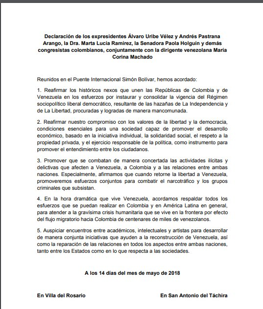 Contenido de la Declaración del Puente Internacional Simón Bolívar del 14 de mayo de 2018.